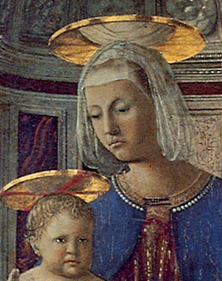 Polyptych of Perugia: Madonna and Child Piero della Francesca Panel, 338 x 230 cm (whole) Perugia, galleria Nazionale dell’Umbria